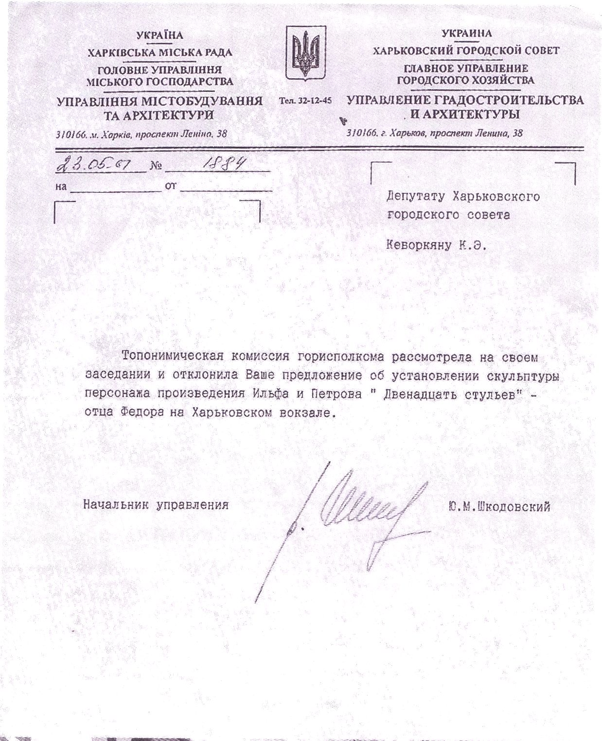 Управление градостроительства и архитектуры Харьковского горосовета (пр.Ленина, 38) Отказ в установке памятника отцу Фёдору на Южном вокзале Харькова.